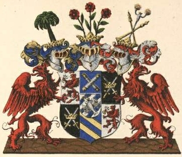 Ferseni suguvõsa krahvivapp